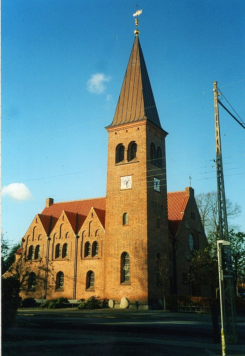 Skovshoved Kirke, Skovshoved Sogn, Gentofte Kommune